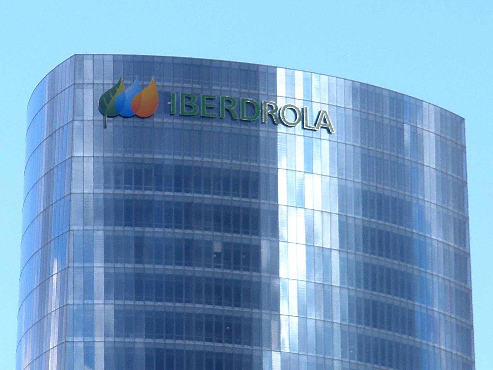 Iberdrola Tower, Bilbao